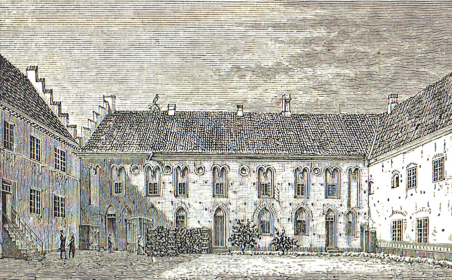 Aalborg Hospital var i den katolske Tid et Kloster, som tillige underholdt fattige og syge; stiftet i det 15de Aarh. Efter Reformationen blev det omdannet til et almindeligt Hospital.